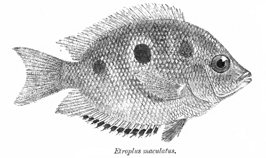 Etroplus maculatus (Bloch, 1795)